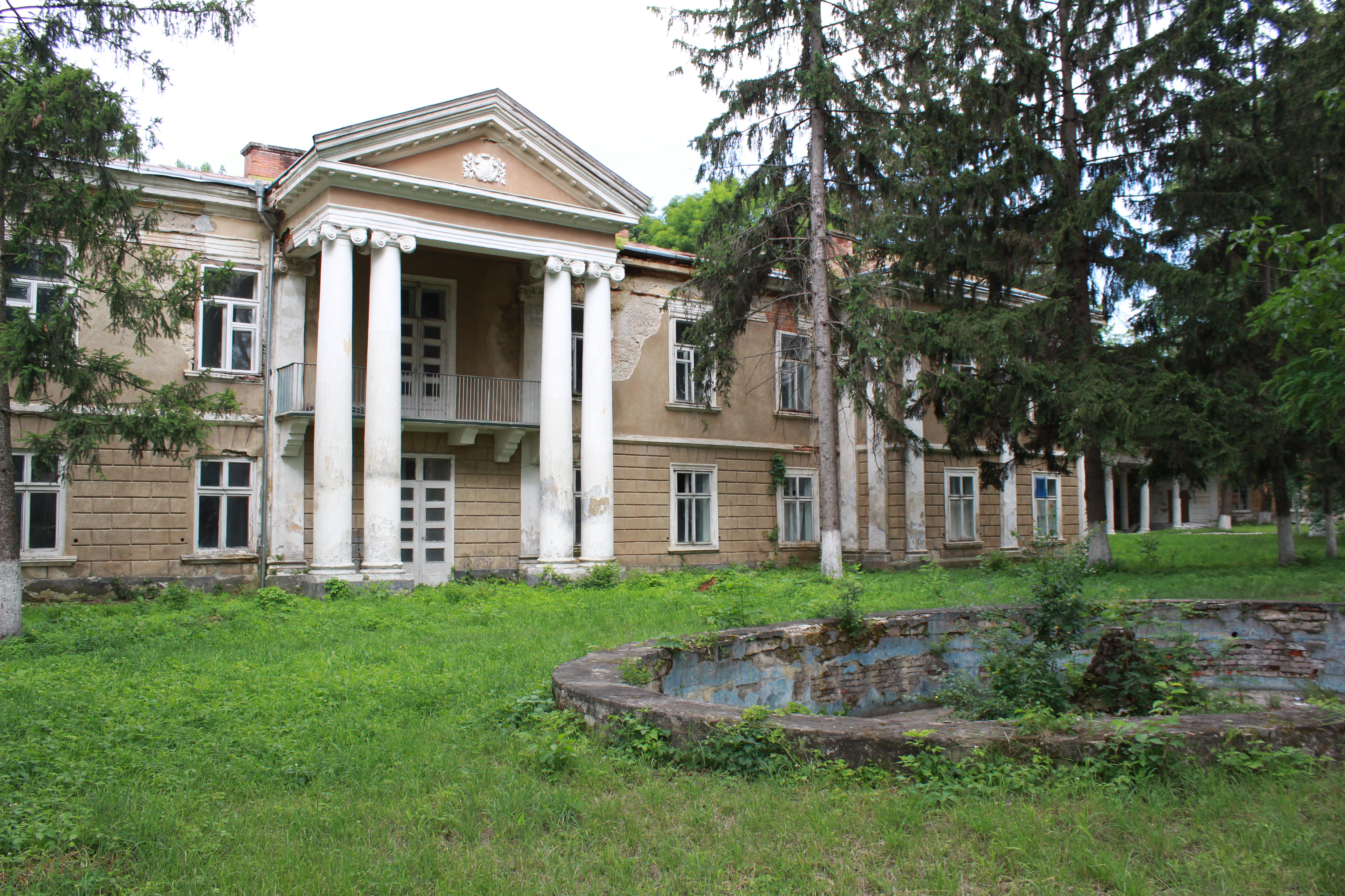 Палац барона Бруніцкого (мур.), Заліщики, вул. С.Бандери, 5